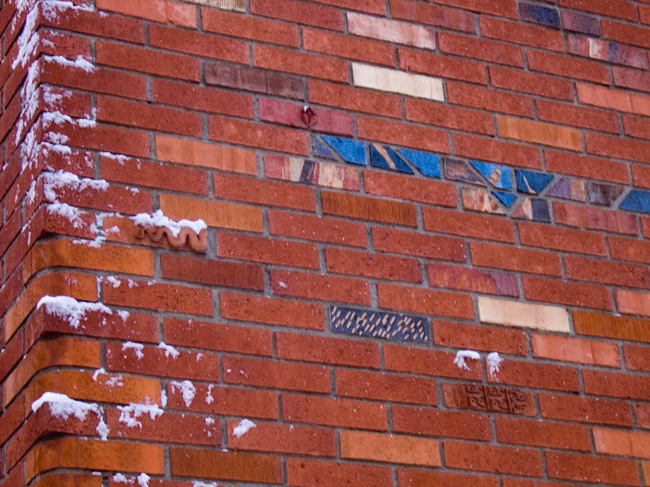 砖墙